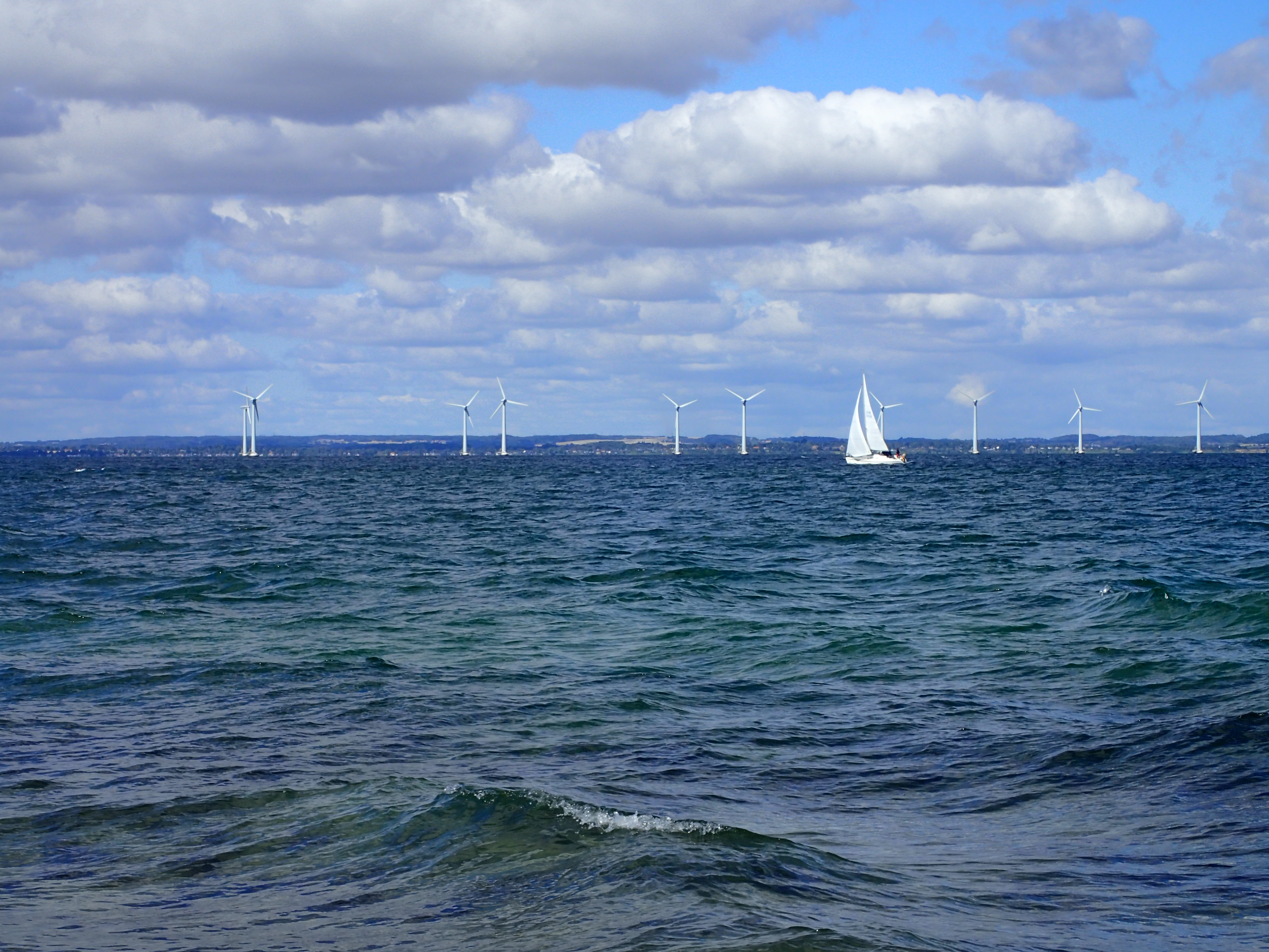 Tunø Knob Vindmøllepark set fra Stenkalven på Tunø.